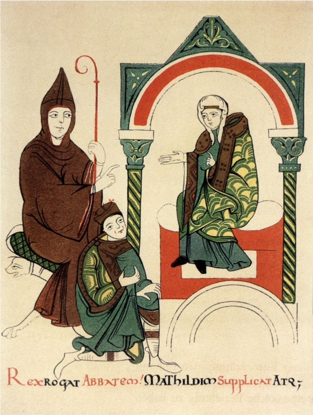 Der exkommunizierte König Heinrich VI. bittet Markgräfin Mathilde um Vermittlung bei Papst Gregor VII. Nachzeichnung einer Miniatur aus der Handschrift Vita Mathildis des Donizo von Canossa (Bildarchiv Preußischer Kulturbesitz)